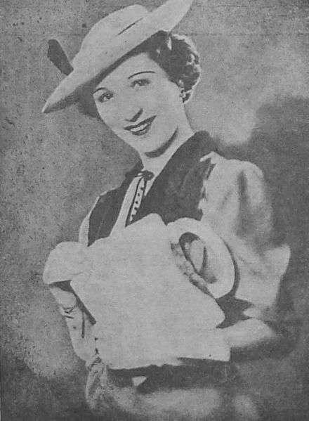 Cantareata Mia Braia